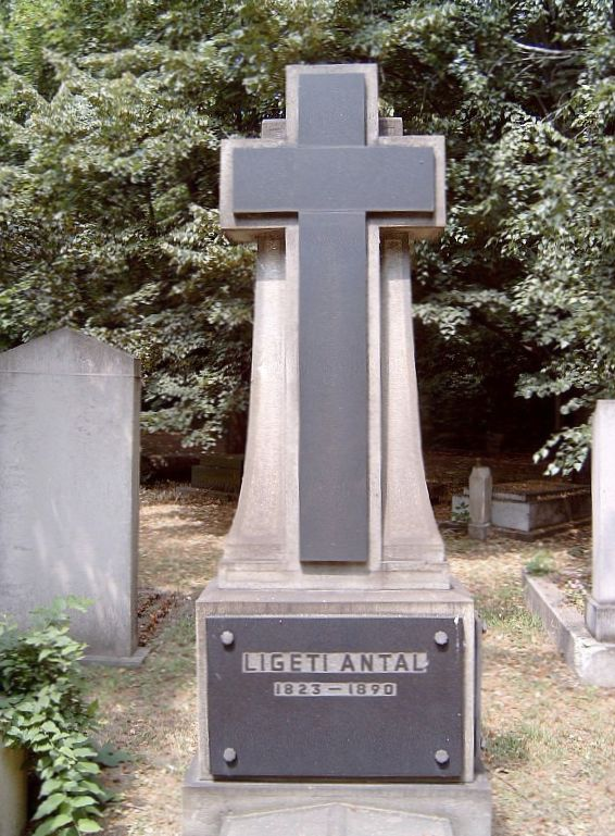 Ligeti Antal (Nagykároly, 1823. jan. 10. – Bp., 1890. jan. 5.): festő sírja Budapesten. Kerepesi temető: 34/2-1-41 [szobrász: Donáth Gyula].